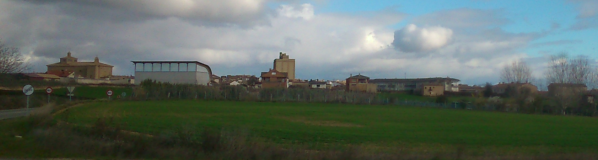 Allo, Navarra